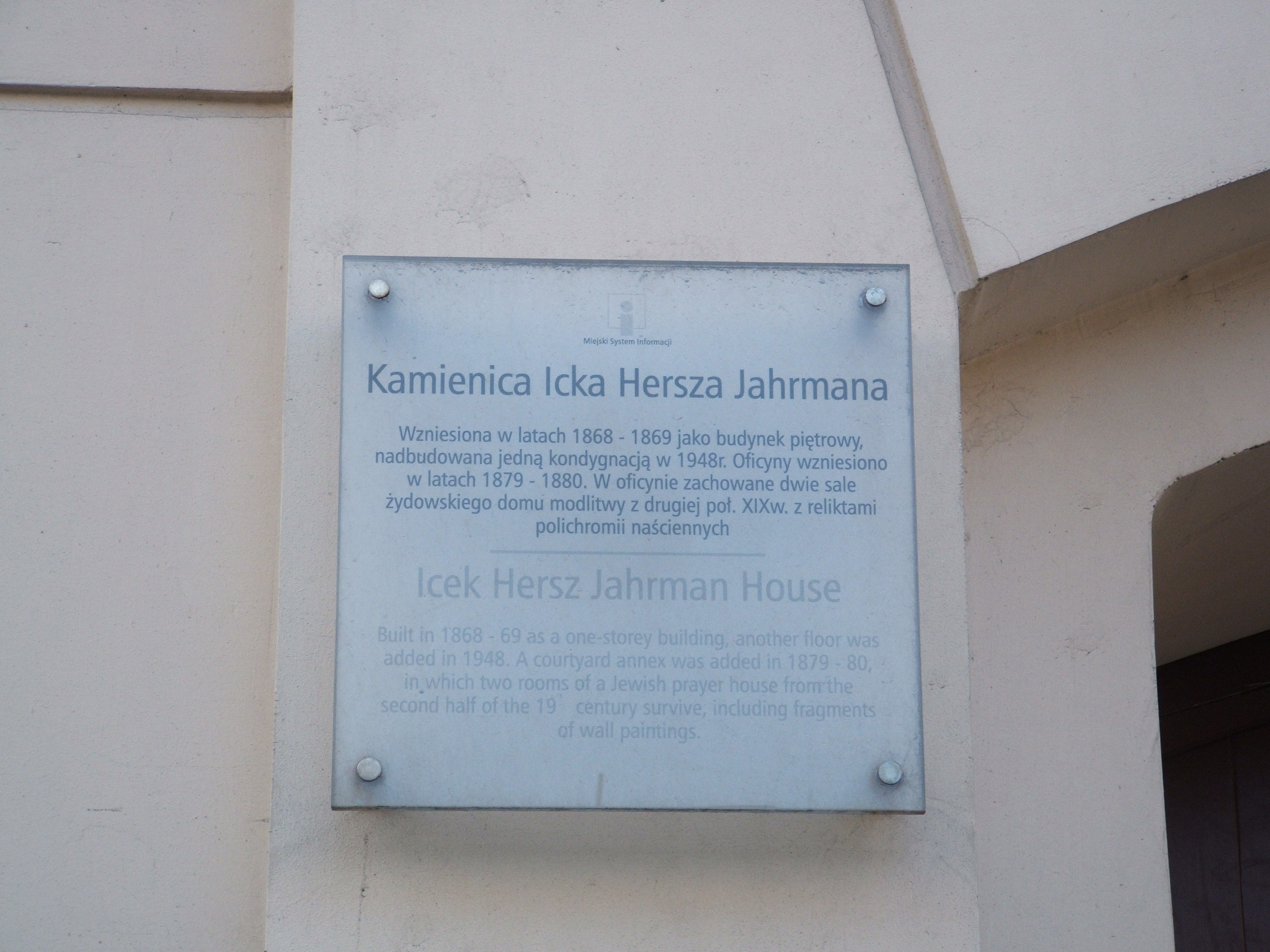 Tablica MSI na budynku przy ul. Ząbkowskiej 11 w Warszawie - "Kamienica Icka Hersza Jahrmana"